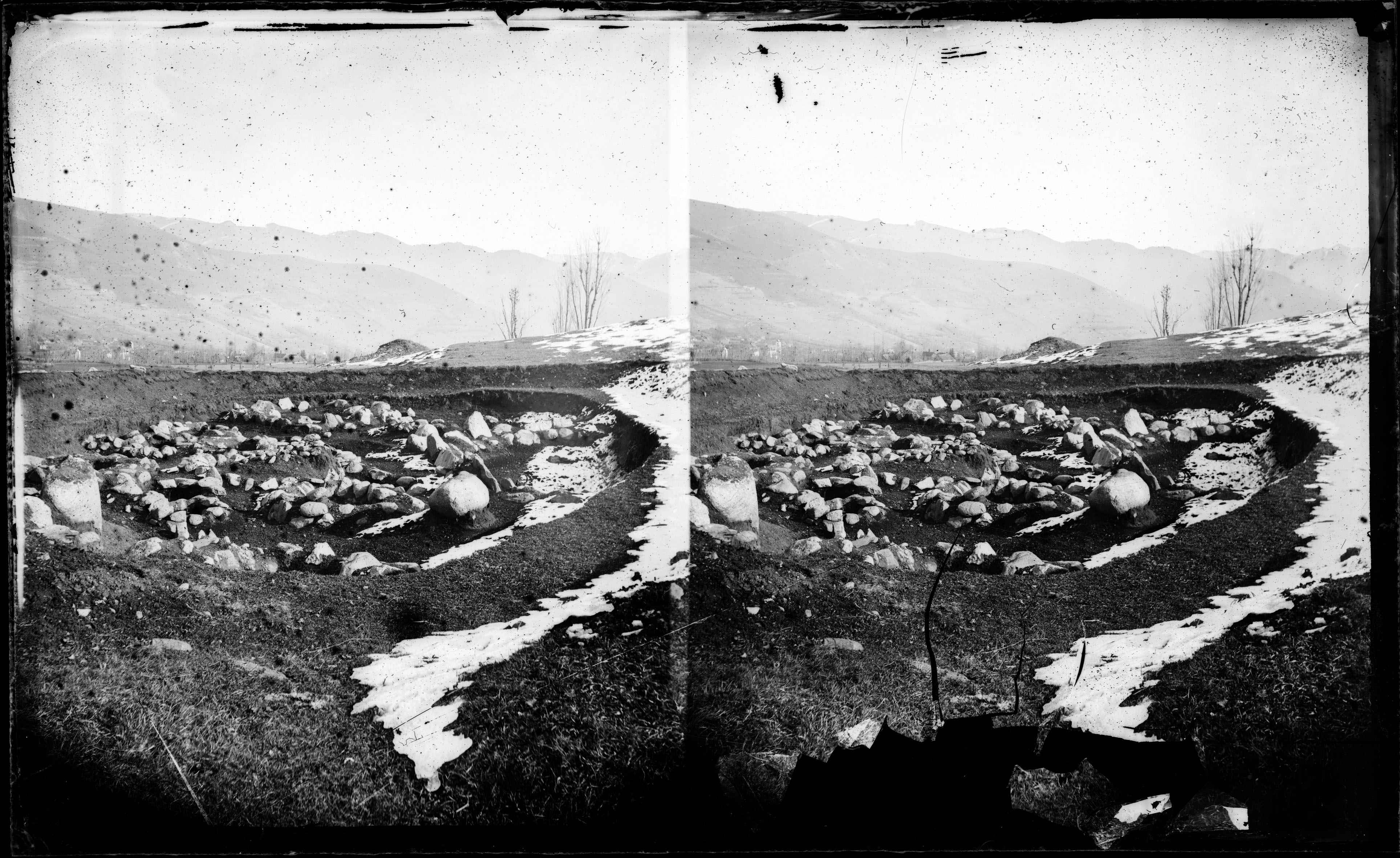 Plaque négative stéréoscopique au collodion au tanin, format 12x20 cm. Inscription manuscrite par Eugène Trutat sur l'enveloppe : " Luchon : cercles de pierres de fouilles de Chaplain Duparc Stéréoscope obj. simples de Darlot coll. tanin